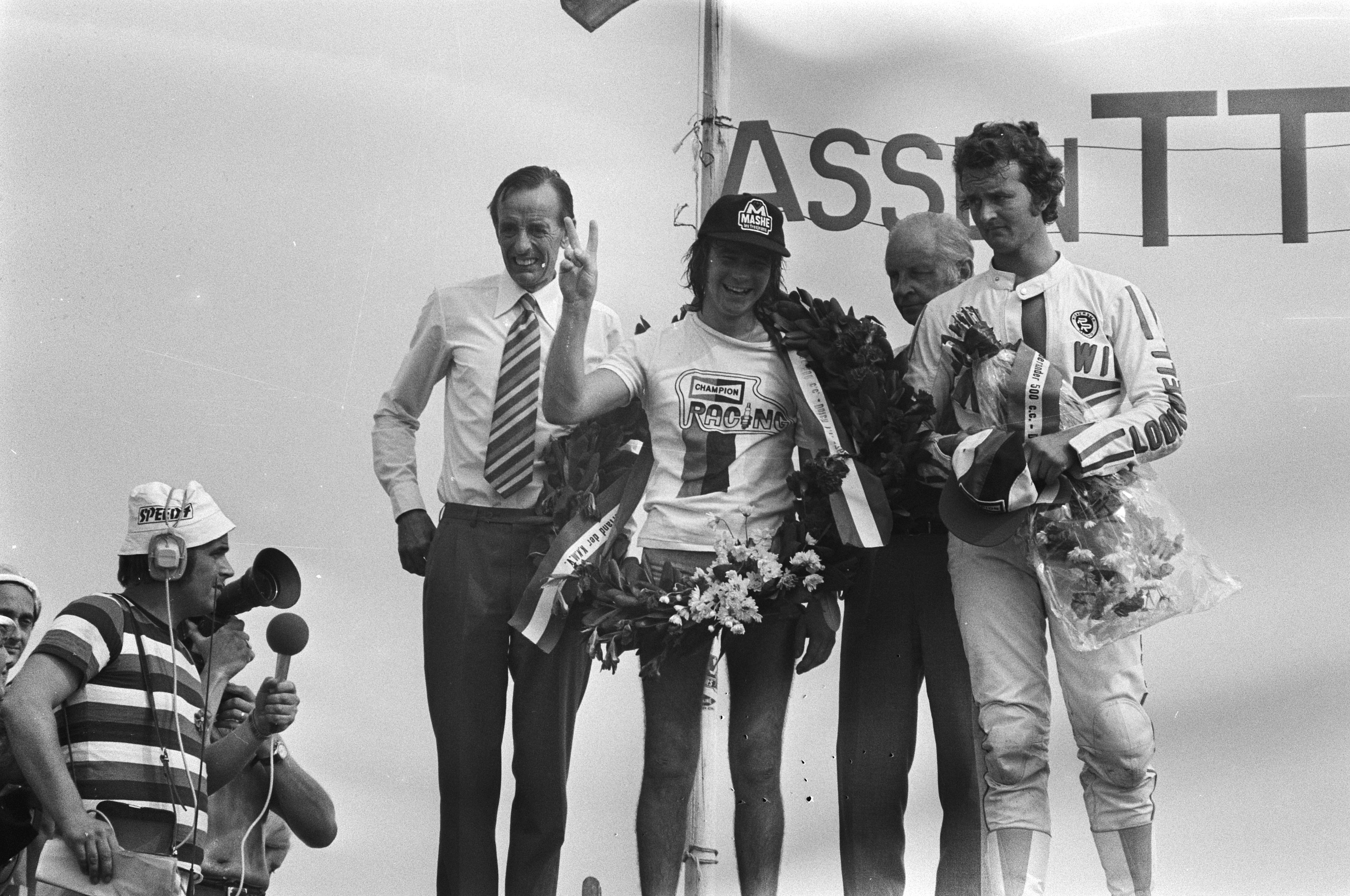 Collectie / Archief : Fotocollectie Anefo Reportage / Serie : TT Assen 1976 Beschrijving : TT in Assen. 500cc klasse. Huldiging Hartog (rechts) en Sheene (midden) Datum : 26 juni 1976 Locatie : Assen Trefwoorden : motorcoureurs, motorfietsen, motorsport Persoonsnaam : Hartog, Wil, Sheen, Barry Fotograaf : Peters, Hans / Anefo Auteursrechthebbende : Nationaal Archief Materiaalsoort : Negatief (zwart/wit) Nummer archiefinventaris : bekijk toegang 2.24.01.05 Bestanddeelnummer : 928-6669